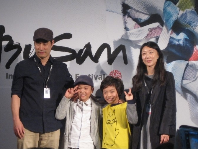 2013년 제18회 부산국제영화제 '한국영화의 오늘-비전' 부문 초청작 영화 《보호자》 출연자들: 왼쪽부터 배성우, 노강민, 염준혁, 고서희.